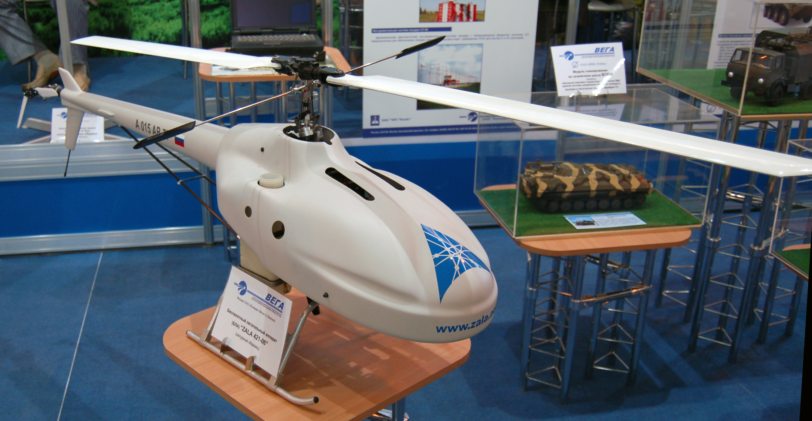 Беспилотный разведывательный вертолёт Zala-421-06. МАКС-2009